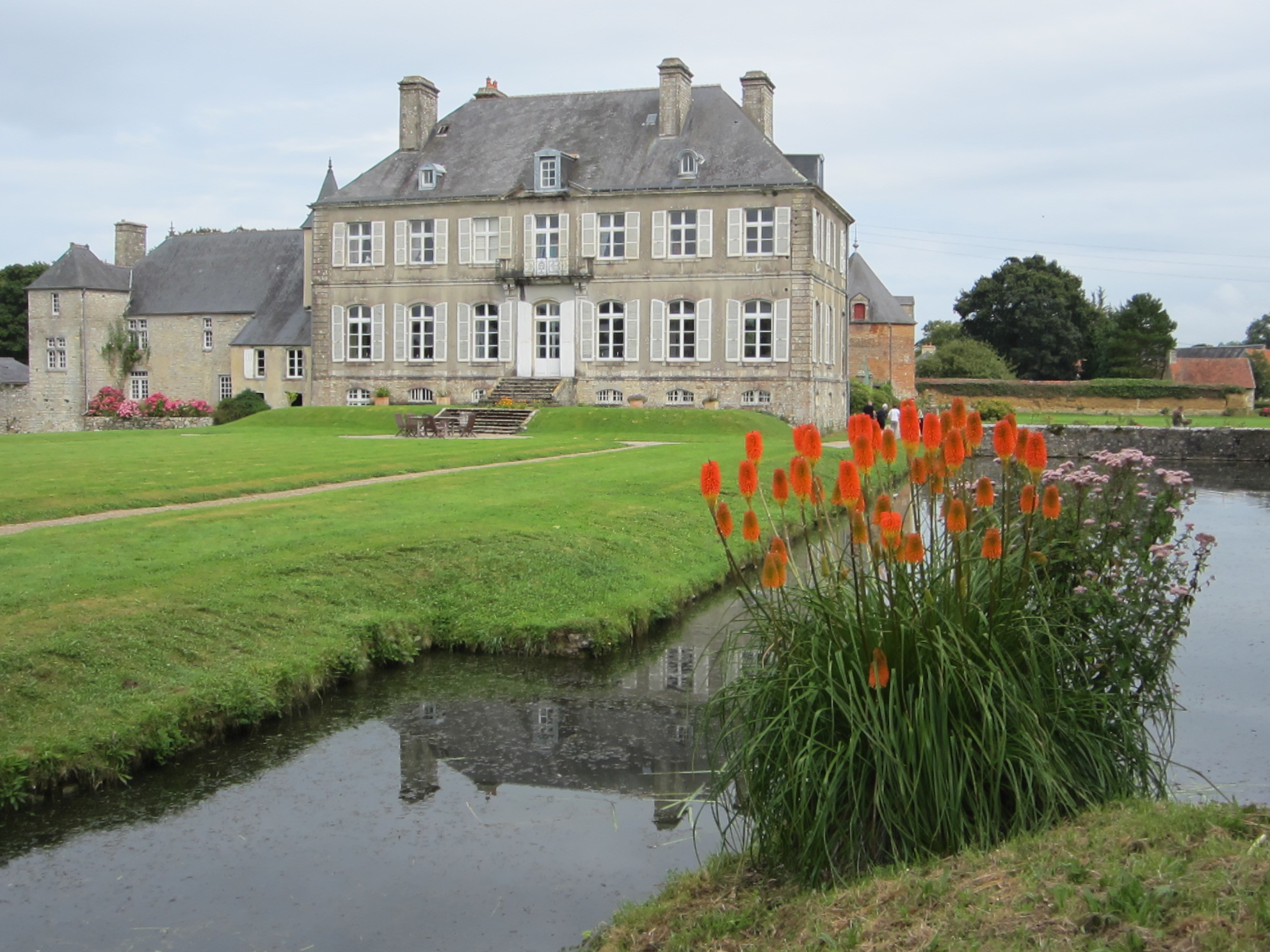 Château de la Bretonnière, Golleville, 17e siècle ; 18e siècle .